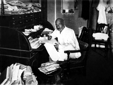 Bal Gangadhar Tilak In Study Room